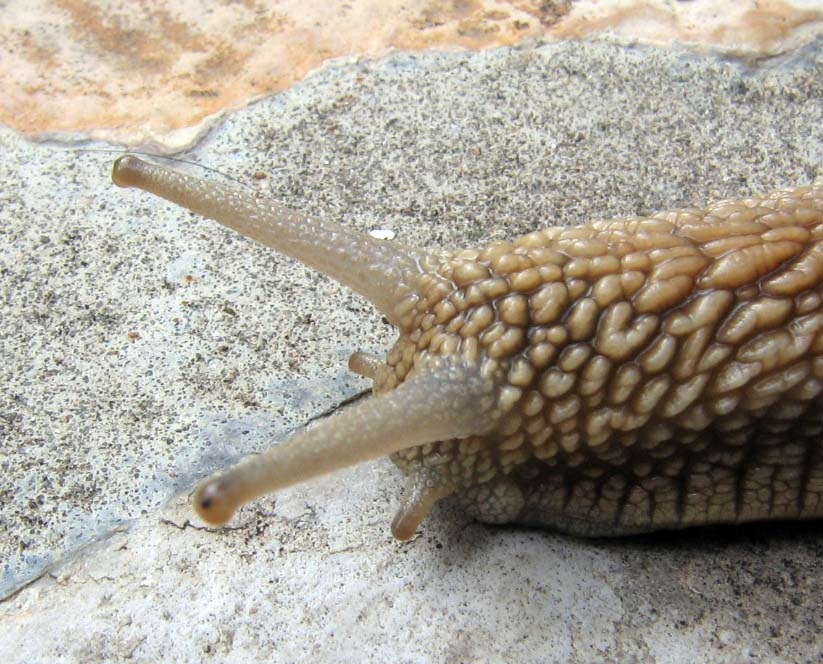 Vinogradski puž u mojm dvorištu